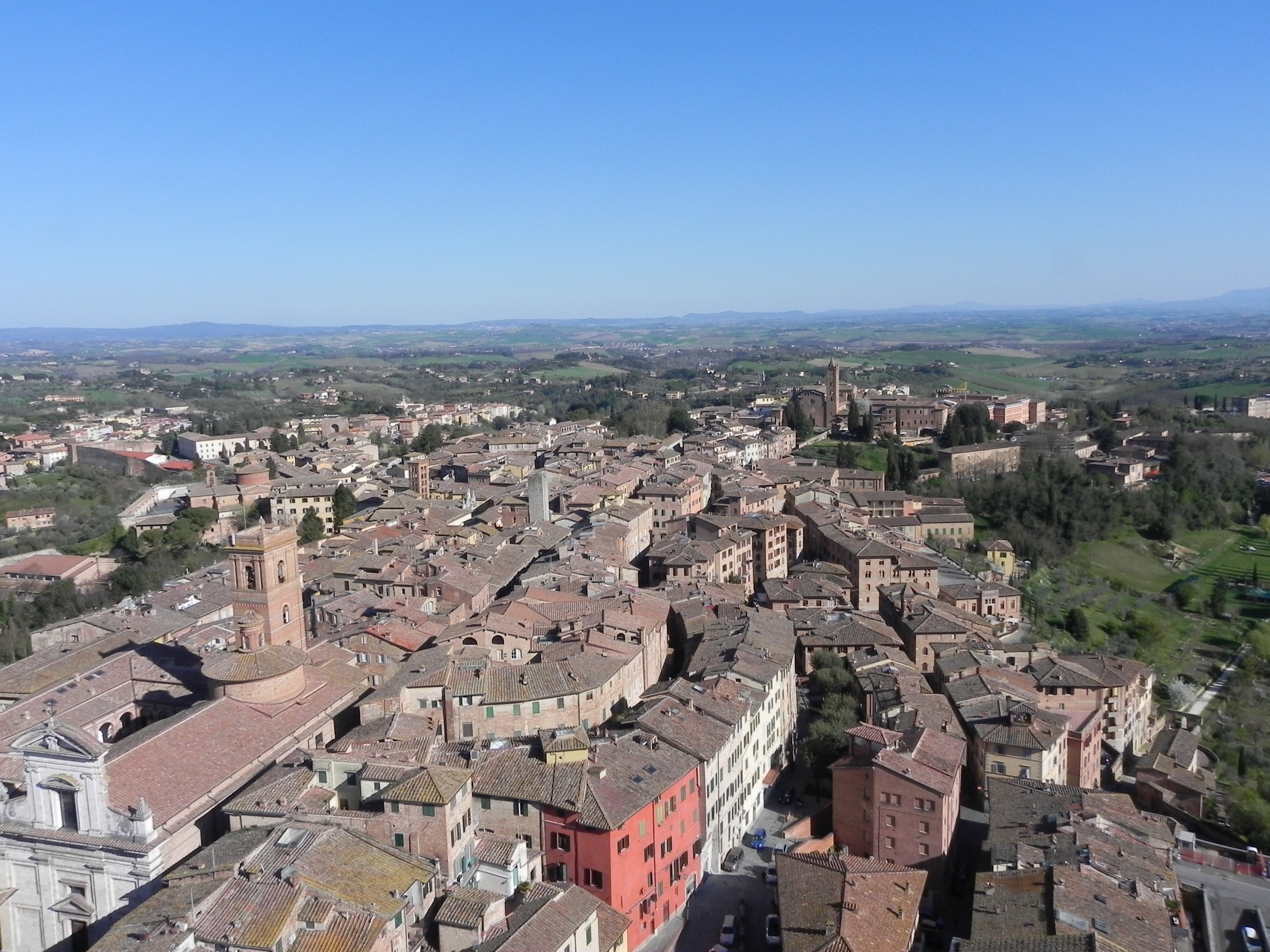 La vista dalla Torre del Mangia in direzione Siena Sud